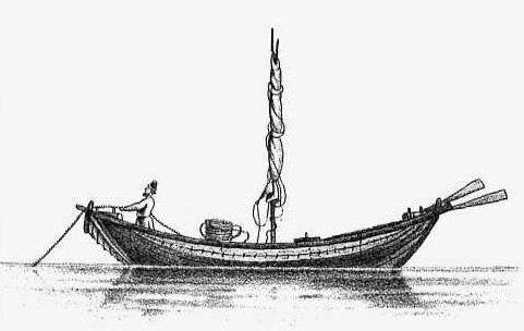 Завозня